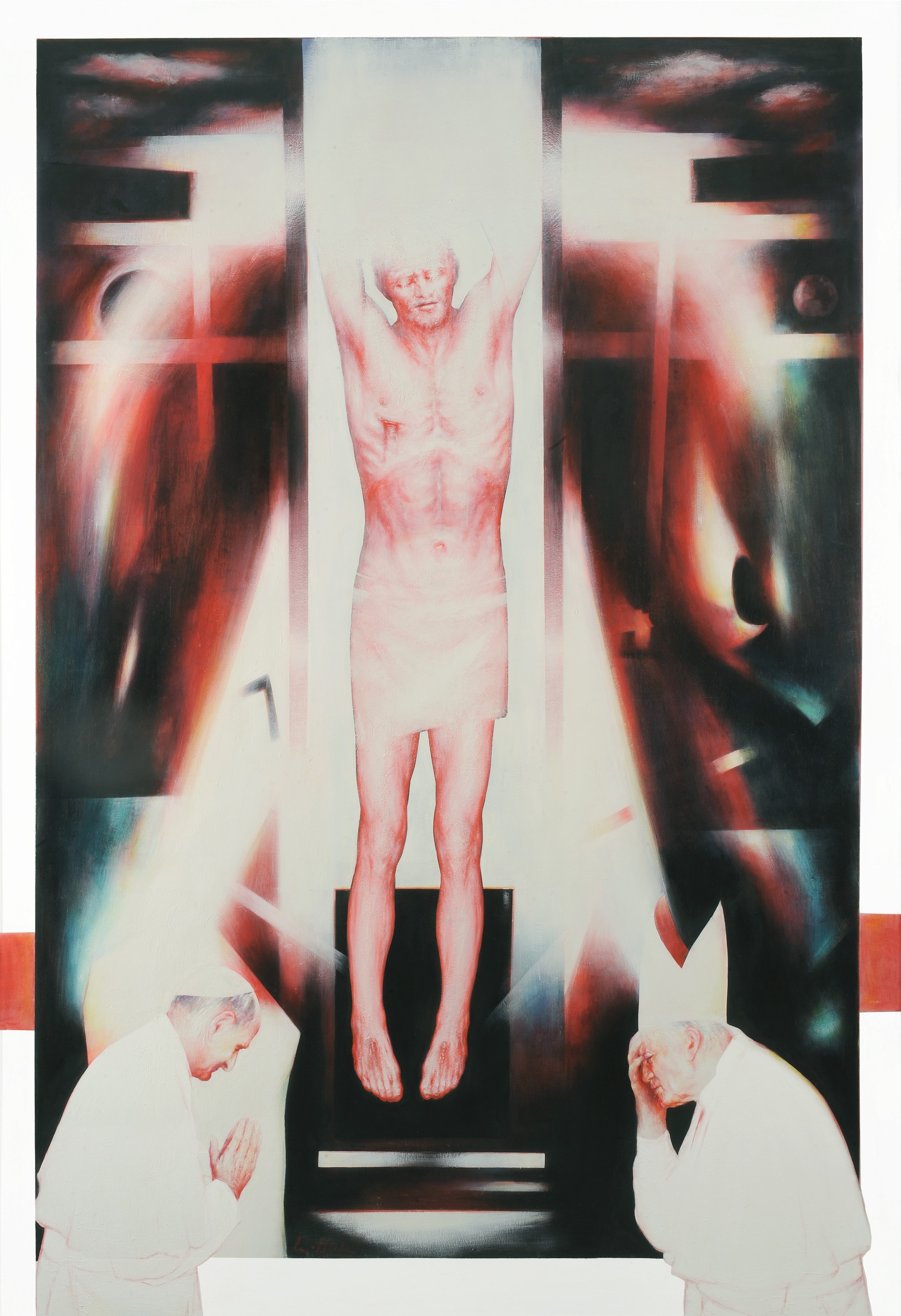 Luigi Mor, "La Preghiera. Omaggio a papa Paolo VI e papa Giovanni Paolo II", 2005, olio su tavola, cm 272 x 186